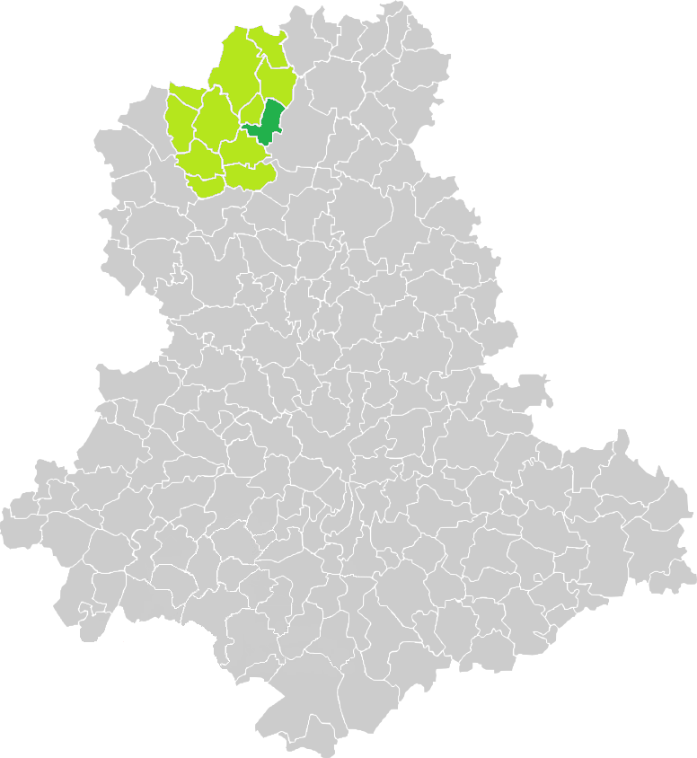 Carte de situation de la commune de Dinsac (en vert foncé) dans le votre Canton (en vert clair) sur une carte des communes de la Haute-Vienne